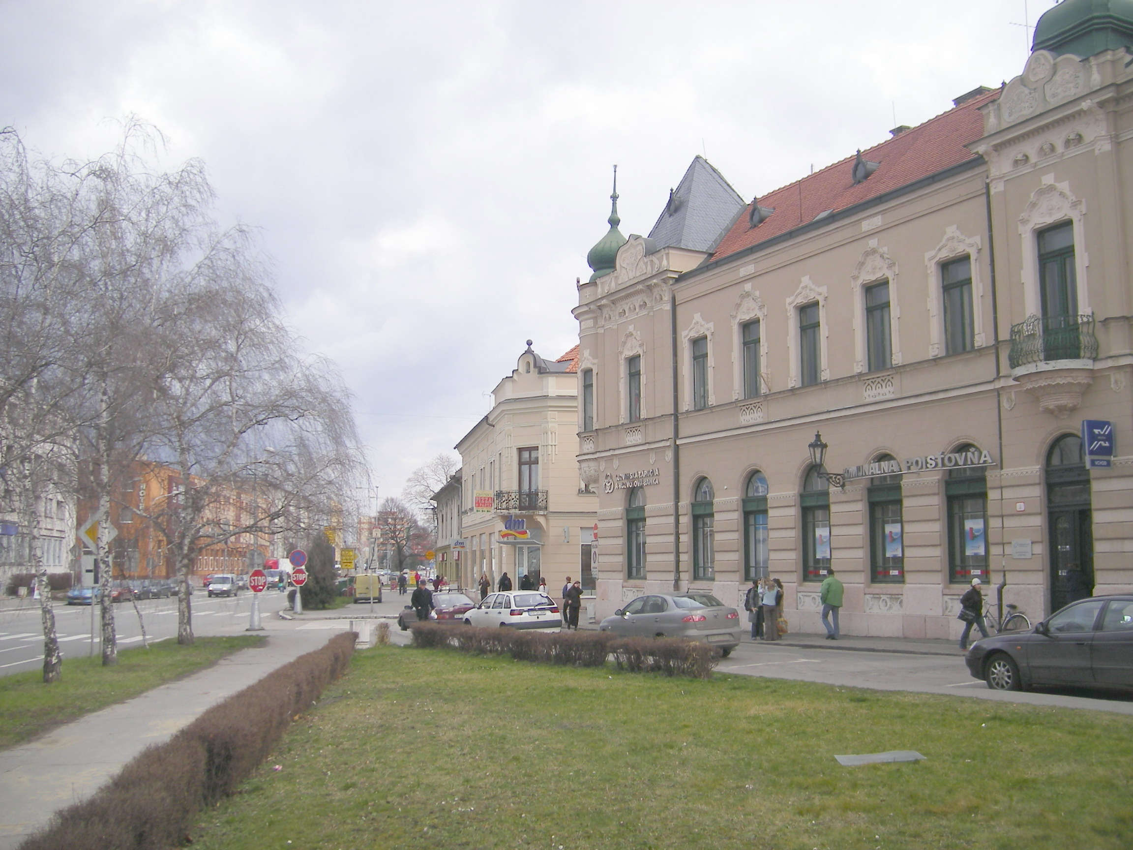 Komárom - Lúdpiac-tér